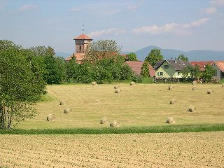 Village de Fontaine (Territoire de Belfort) Photo prise en mai 2004 par LP90 Licence GFDL LP90 mai 2004